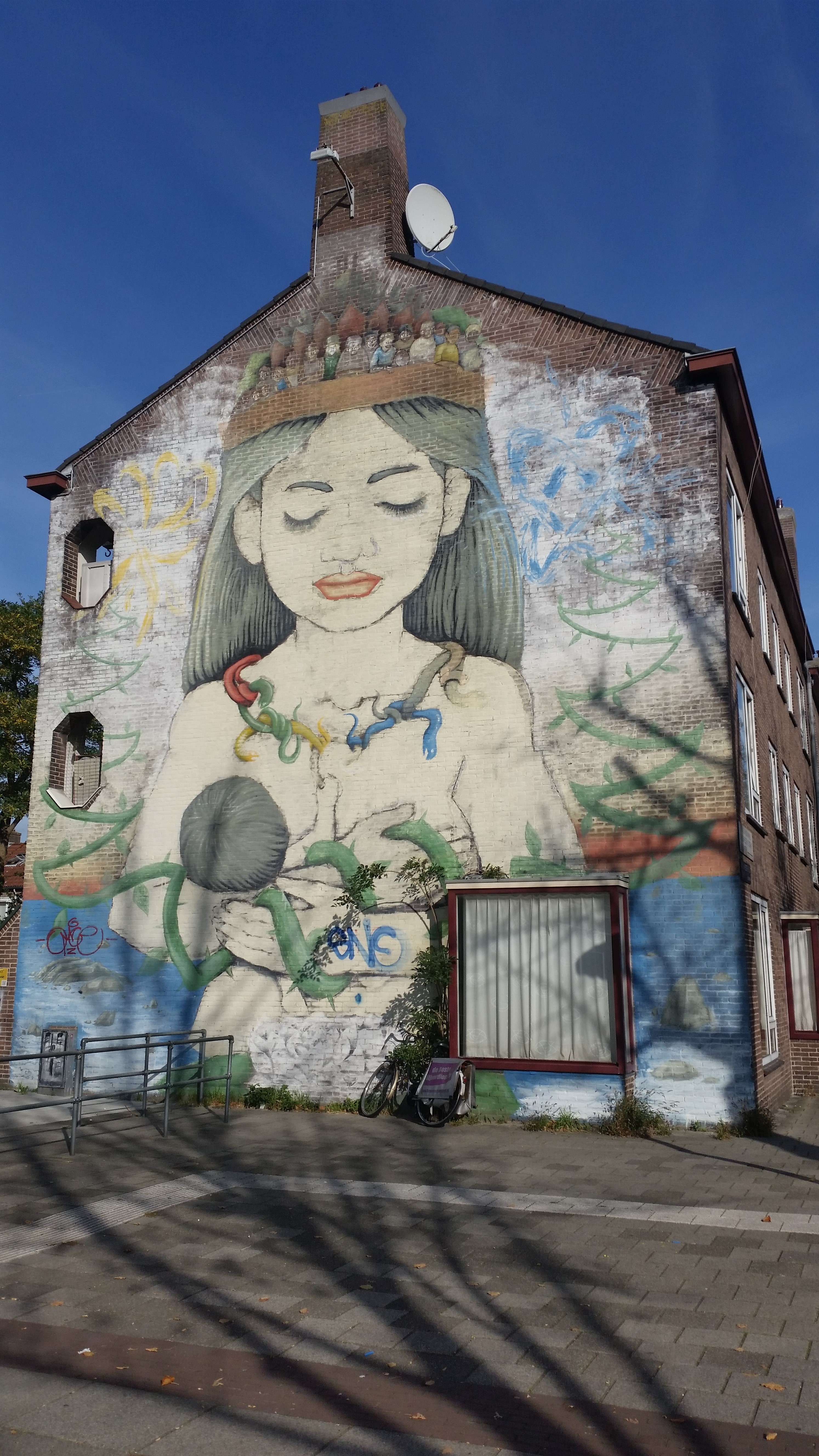 Mural getiteld Tolerance op gevel van Burgemeester Fockstraat (rechts) en M.C. Addickstraat in Slotermeer; gezet door Argentijn Alaniz; titel verwijst naar tolerantie tussen generaties die in de wijk wonen.